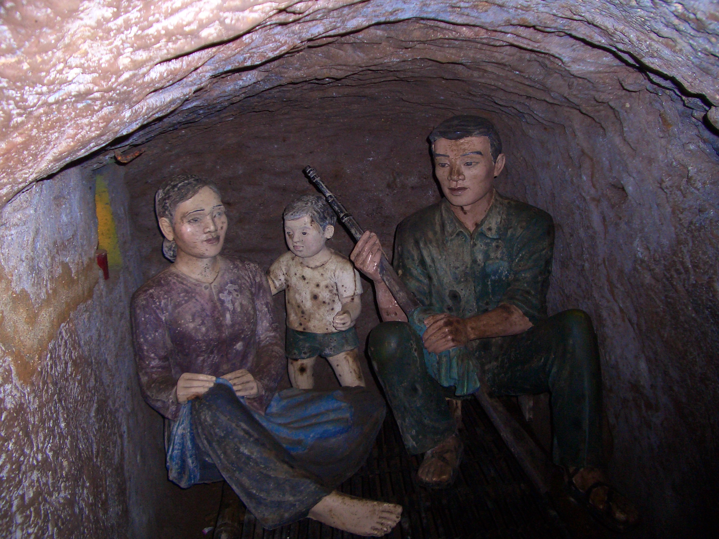 A family room in Vinh Moc tunnels, Quang Tri, Vietnam.